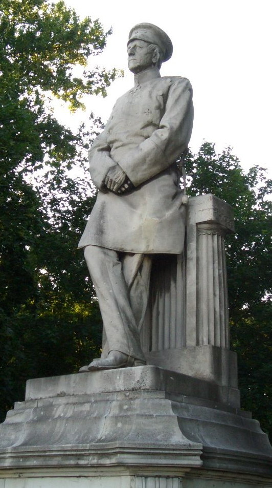 Moltke, Bild verschlankt